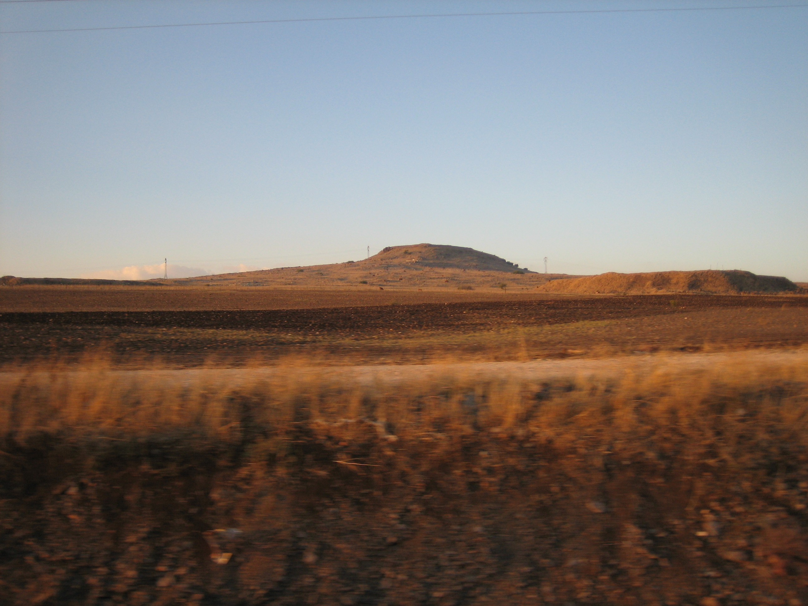 Horns of Hittin (Israel), the battlefield, where Salah ed-Din has defeated the Crusaders' army in 1187. / Hattinski rogovi (Izrael), bojno polje između Nazareta i Tiberijade, gdje je Saladin 1187. god. pobijedio križarsku vojsku.